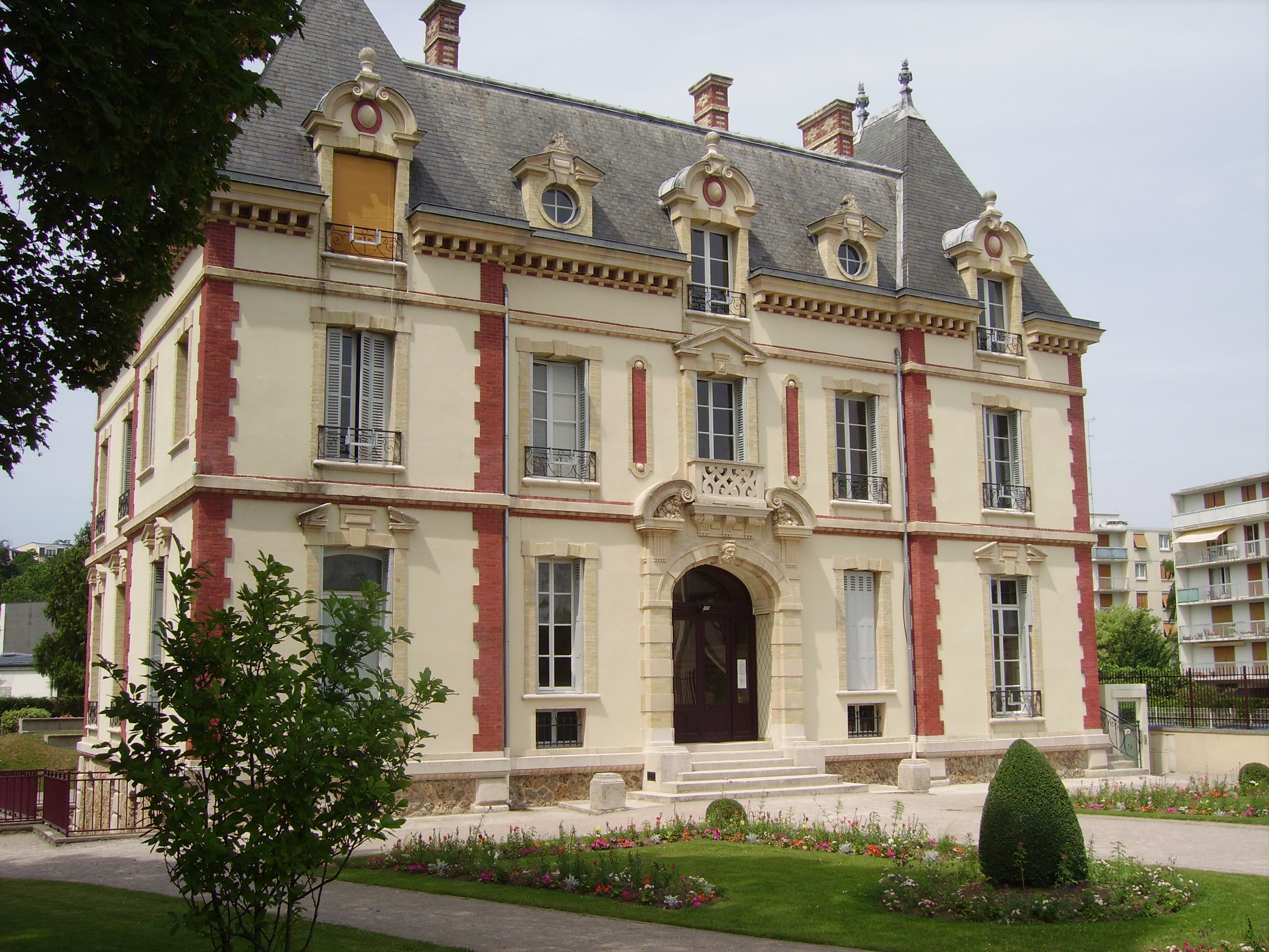 Meaux(Seine-et-Marne):Le conservatoire de musique